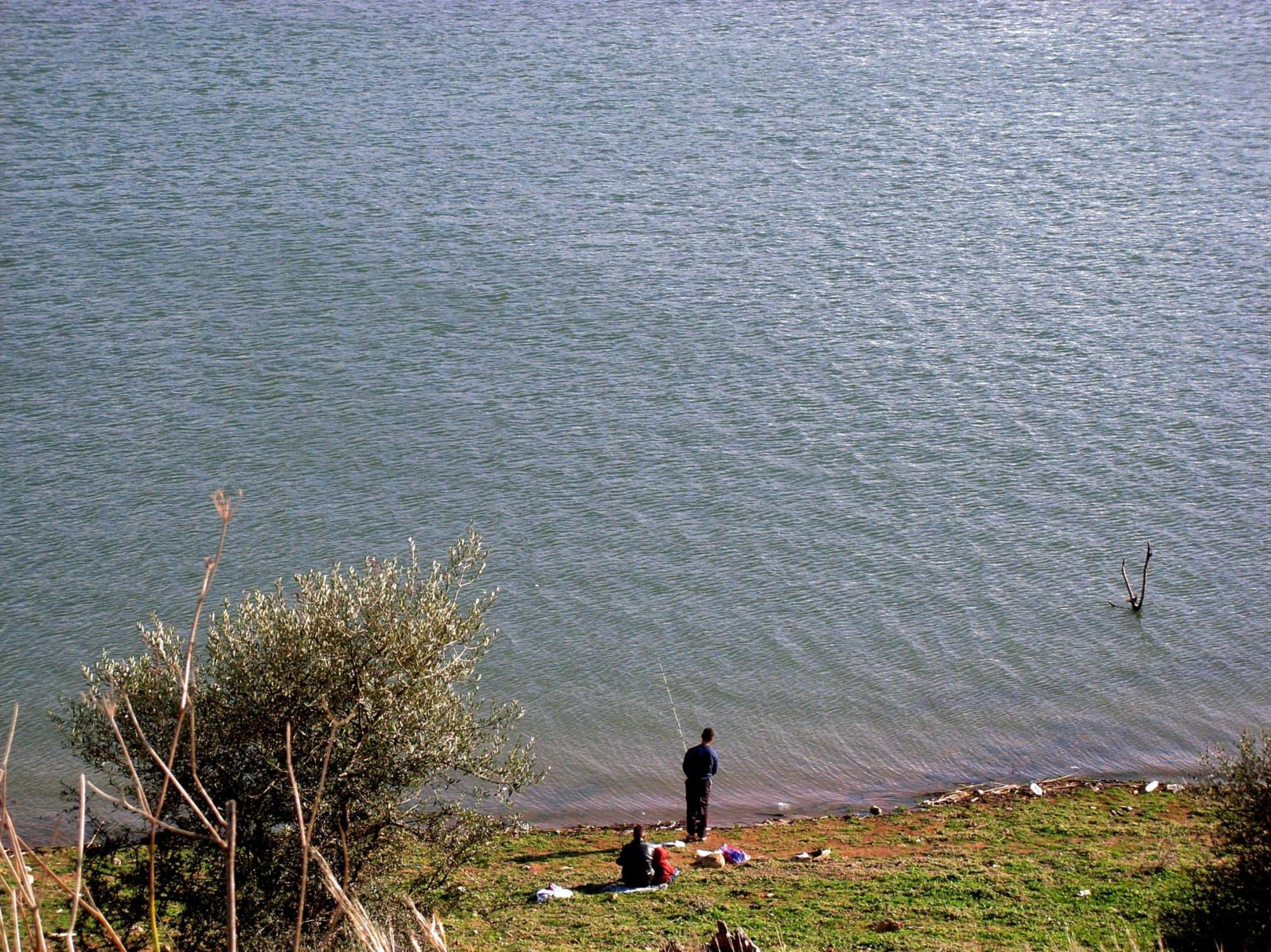 jour de peche